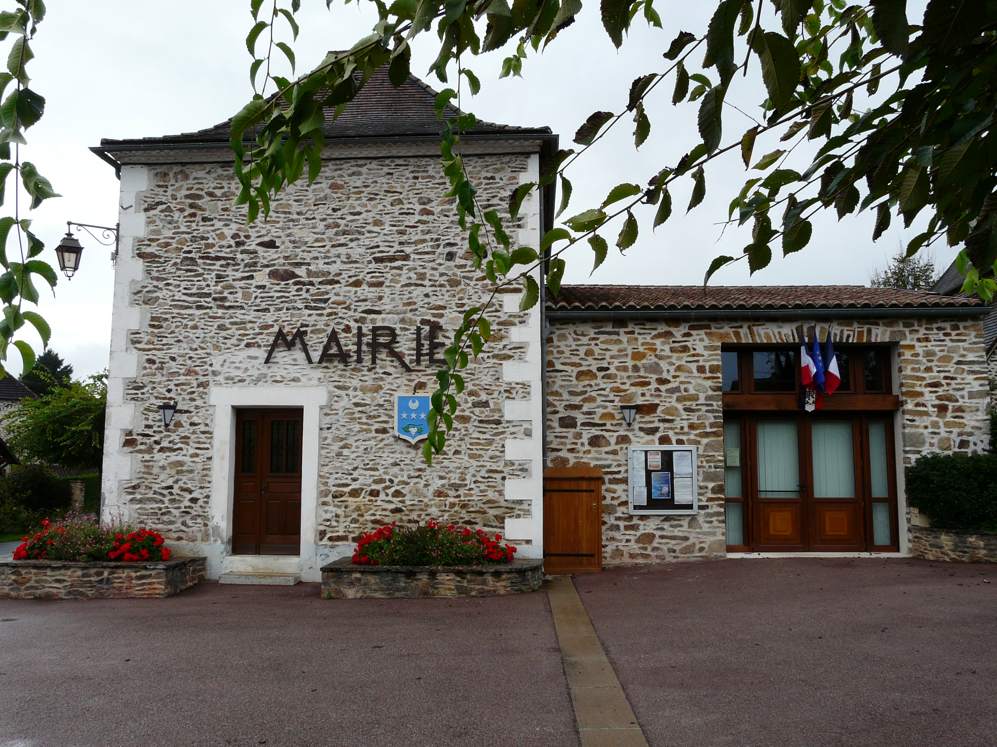 La mairie de Saint-Pierre-de-Frugie, Dordogne, France